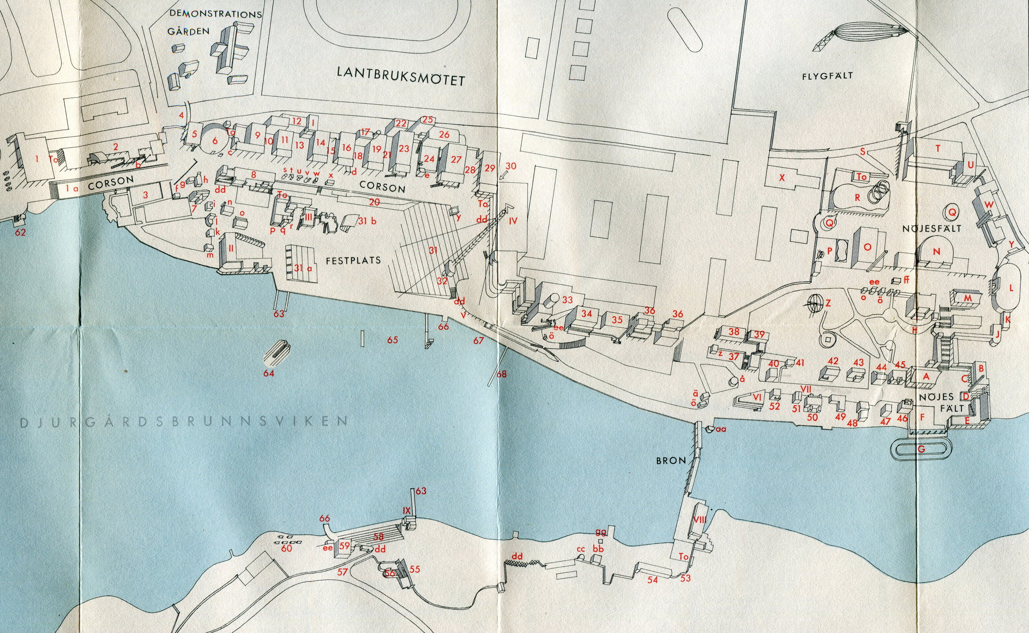 Stockholmsutställningen 1930,plan över utställningsområdet